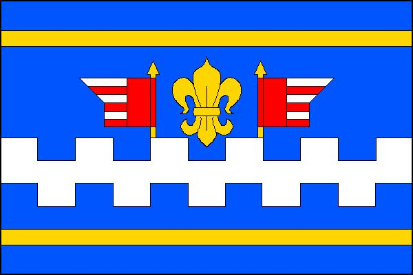 Vlajka obce Sulislav (okres Tachov)